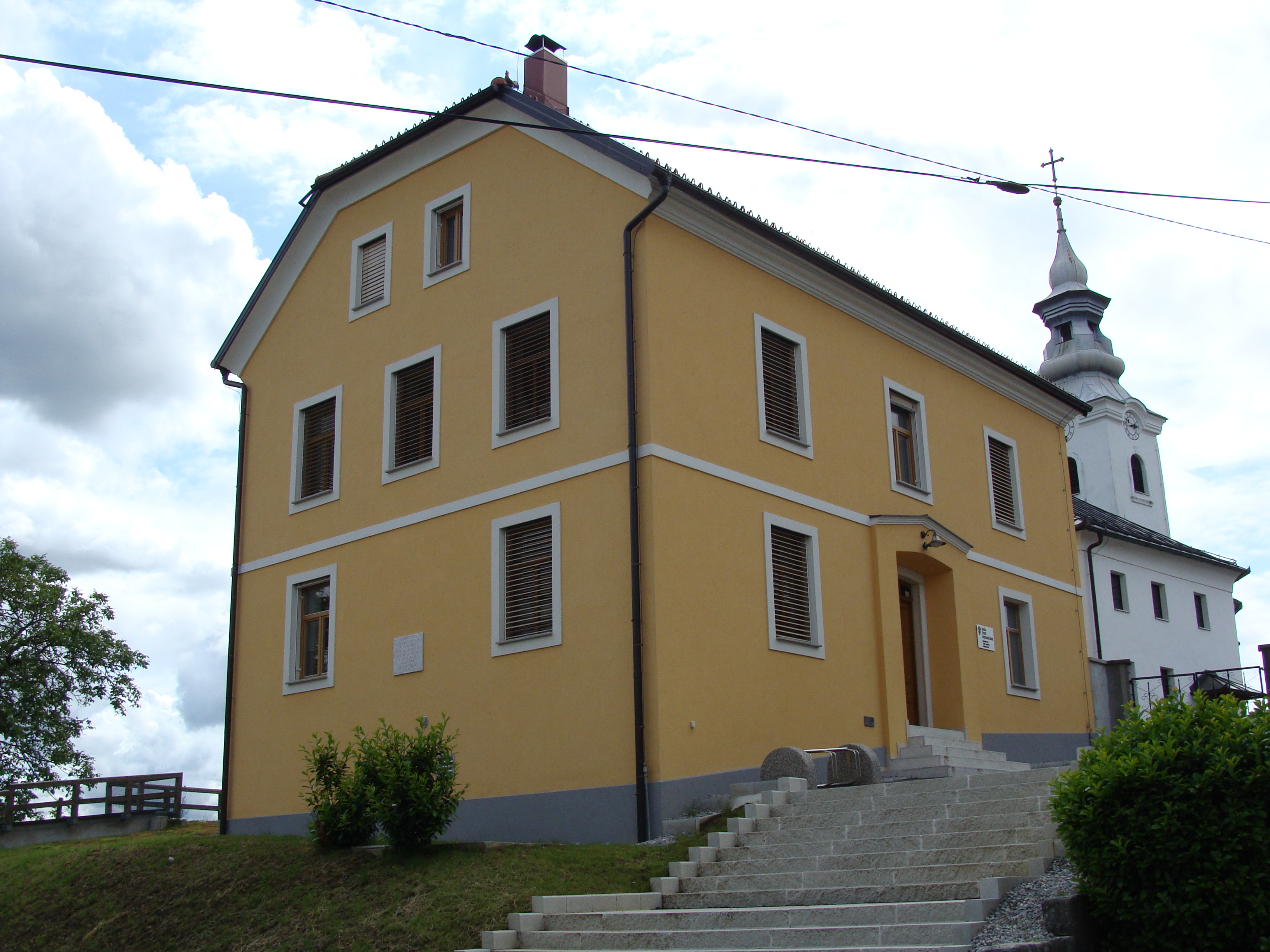 Hiša žive dediščine